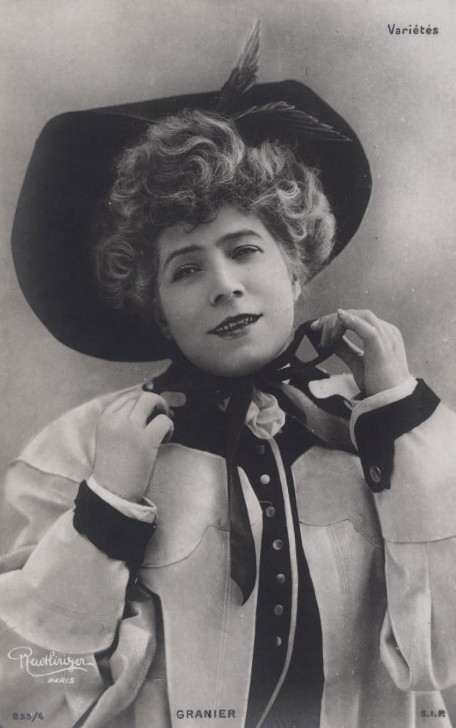 Jeanne Granier